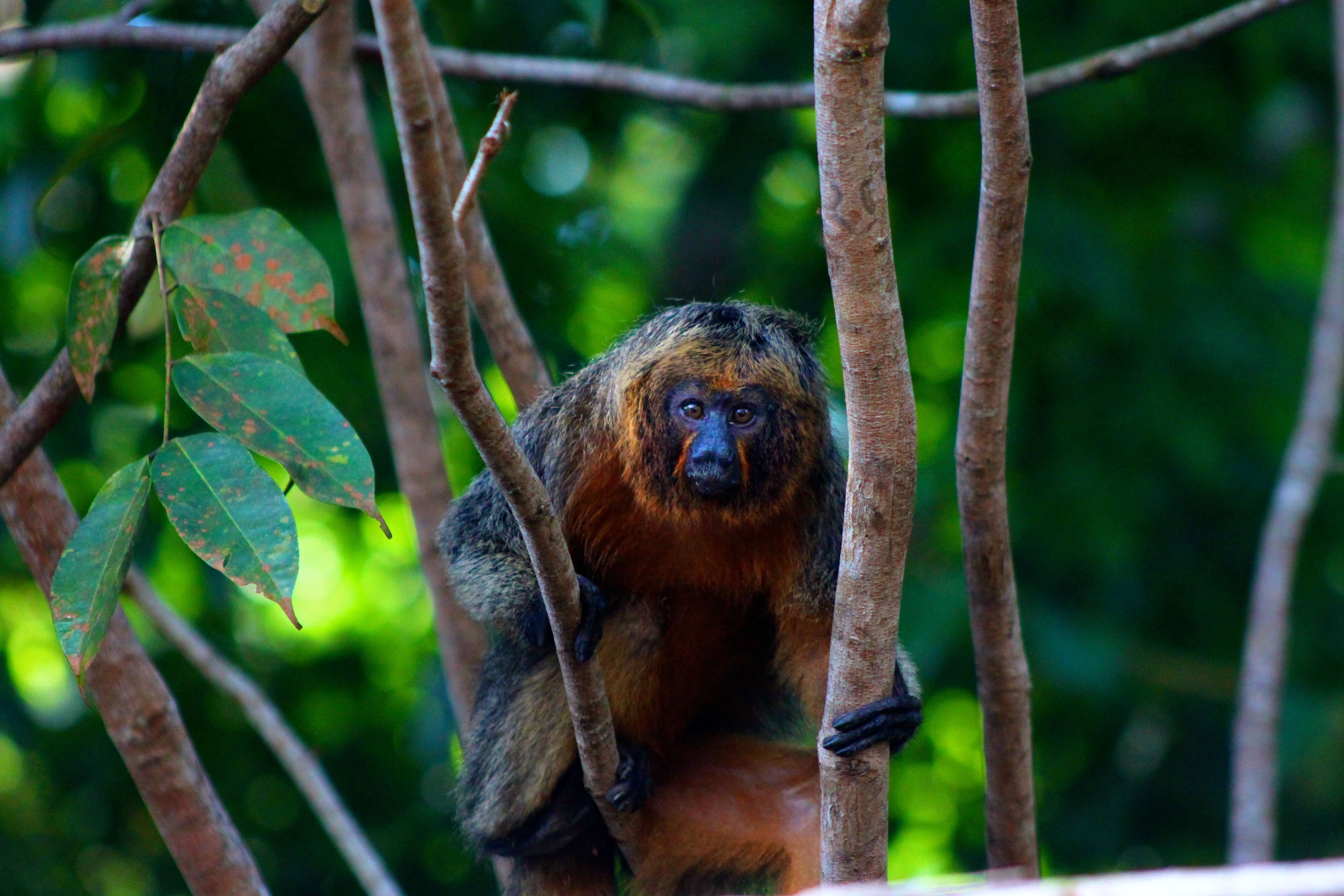 Espécie de Mico entre galhos no Parque Nacional do Jaú, Amazonas.